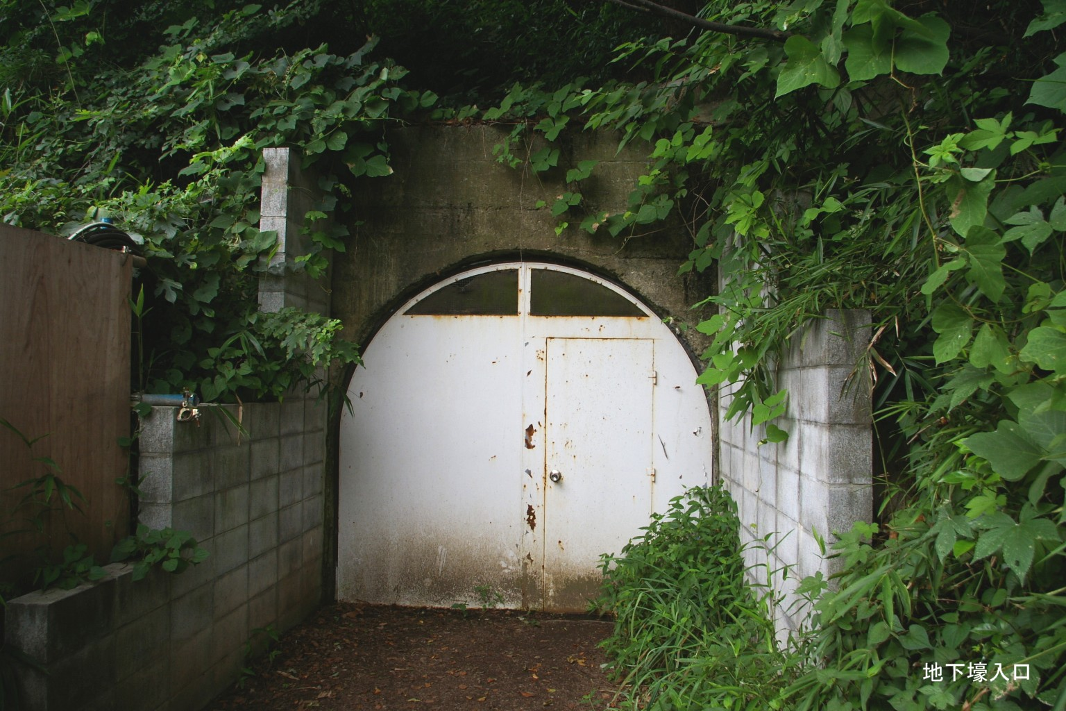 2009.5日本国内で塾生 (talk)が撮影。